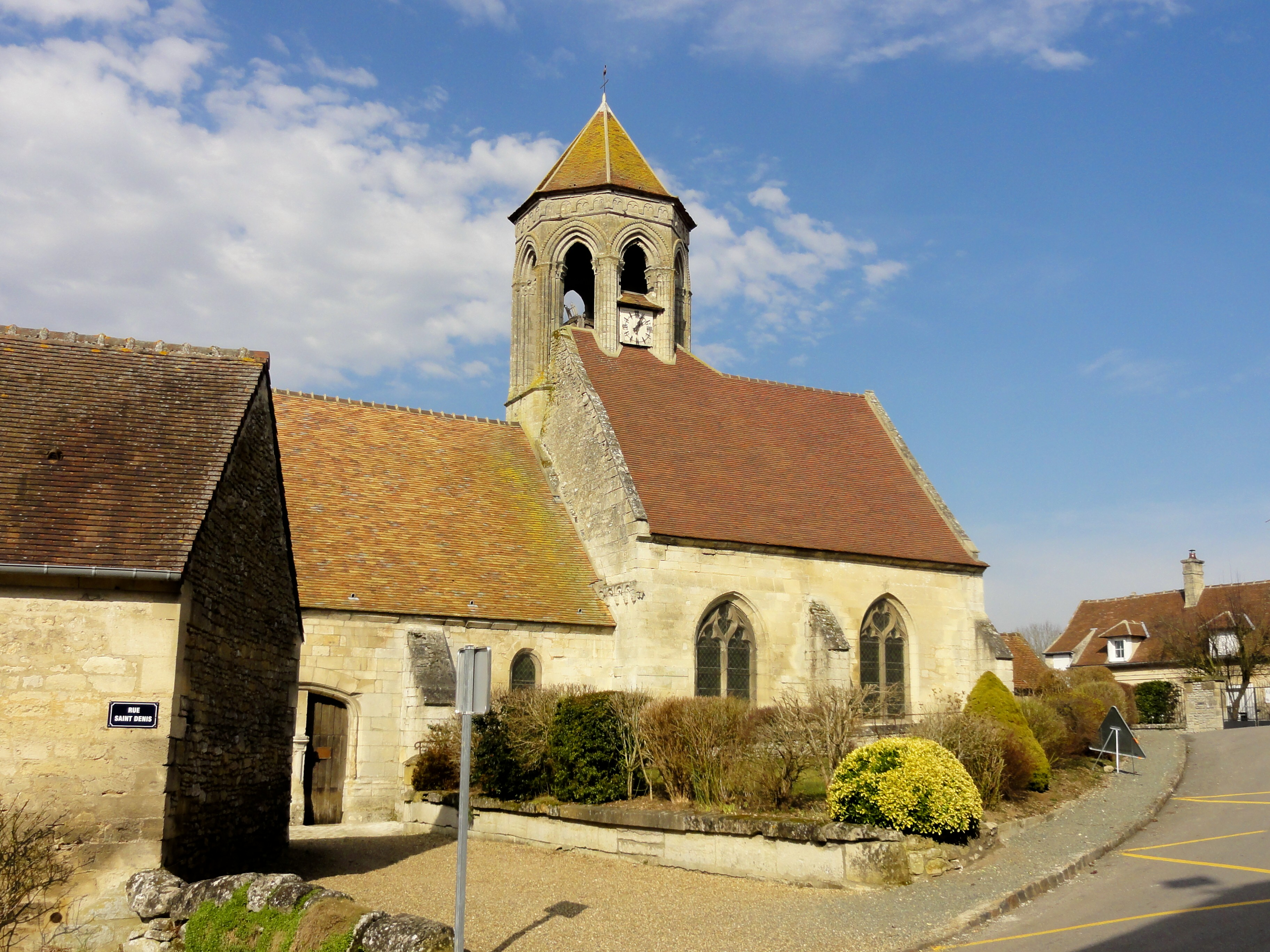 Vue depuis la rue Saint-Denis.